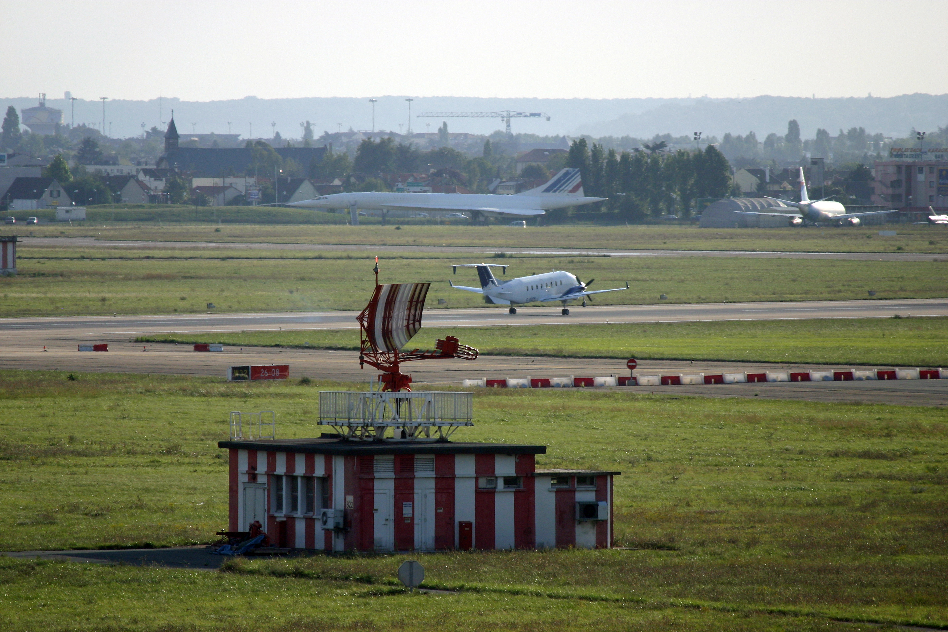 Radar Ta10 de Orly. Au fond, on voit le concorde du musée de l'air, et un avion en train d'atterrir